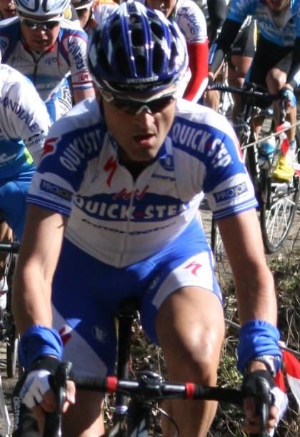 Kevin Hulsmans, au mont Kemmel lors des Trois jours de Flandre occidentale